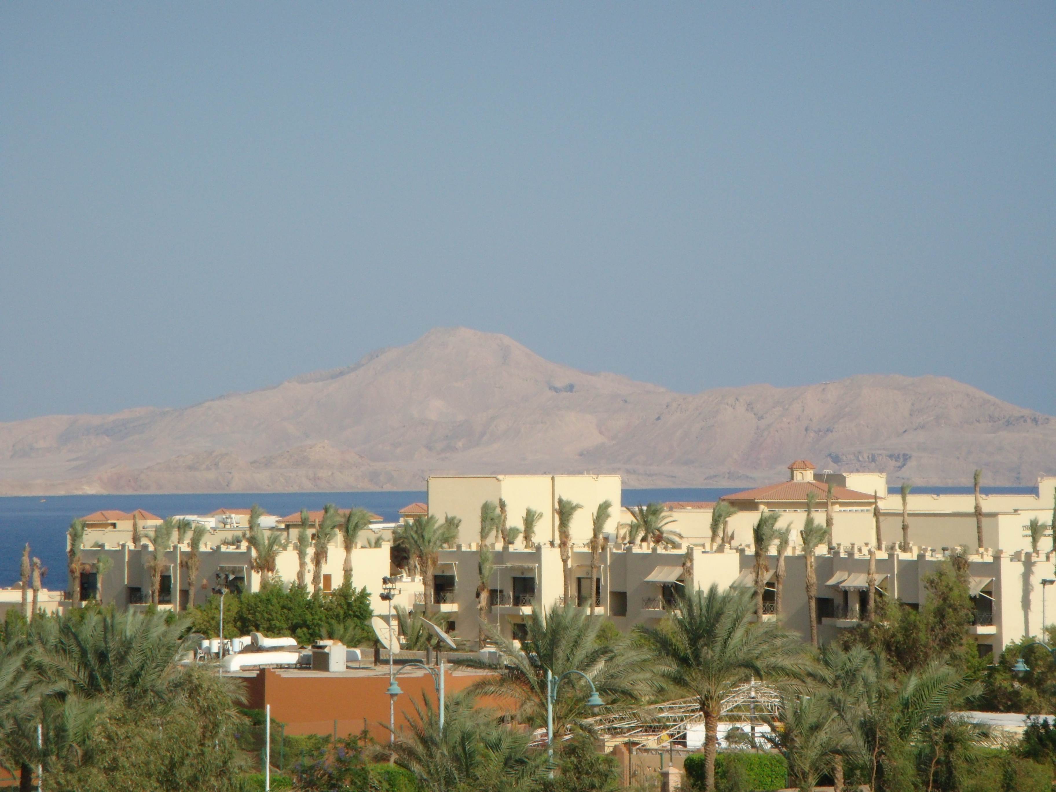 SHARM EL-SHEIKH.Wyspa Tiran.